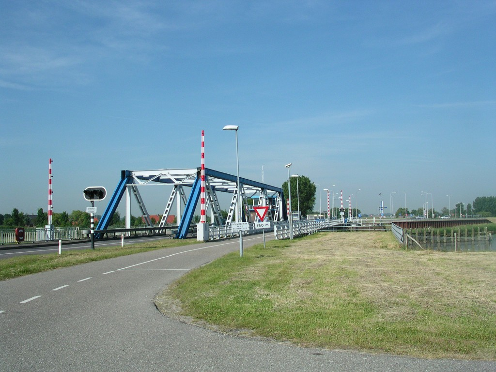 De brug en sluis van Amsteldiepdijk bij Van Ewijcksluis. The bridge en lock from Amsteldiepdijk near Van Ewijcksluis.